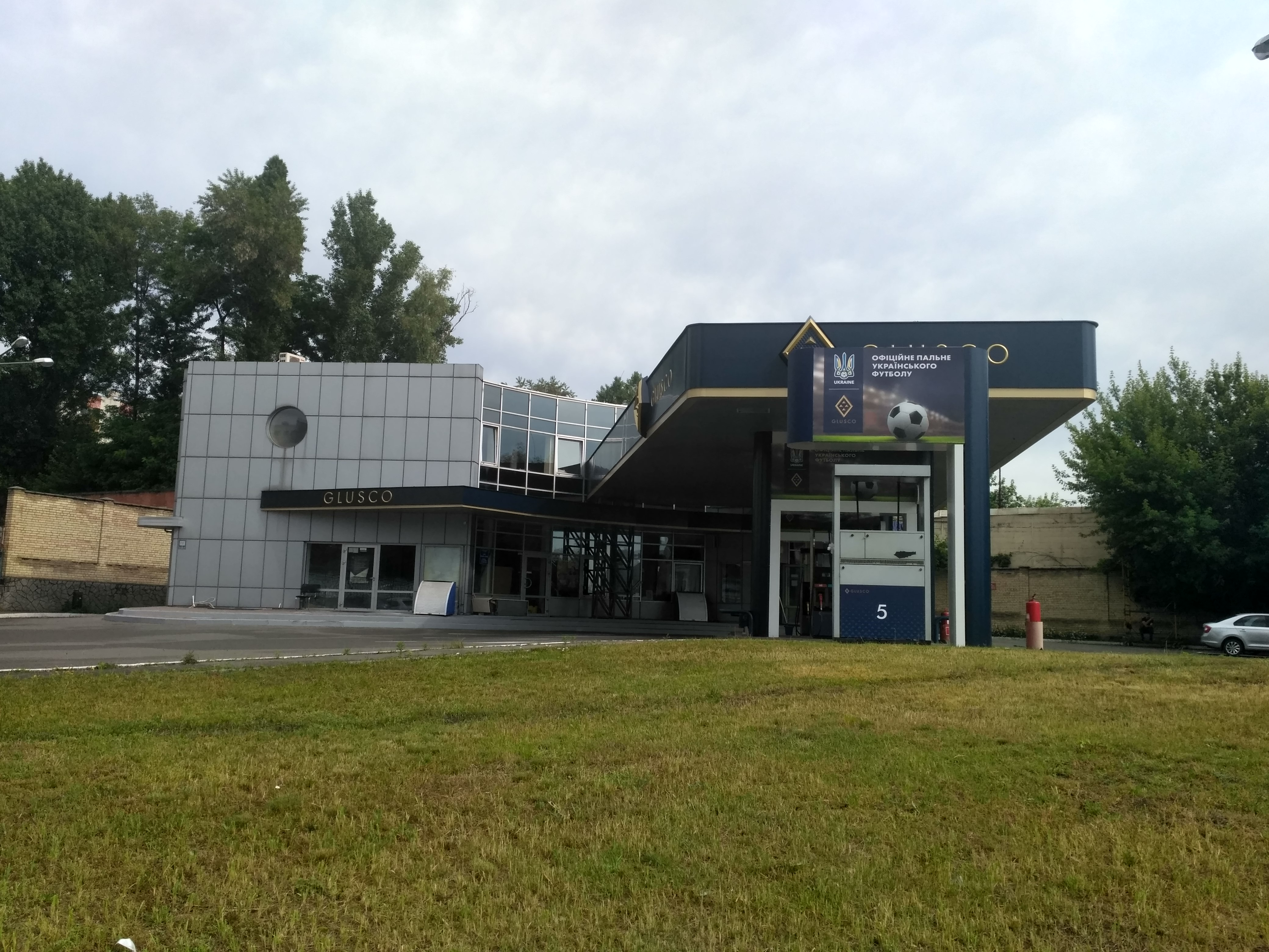 Glusco